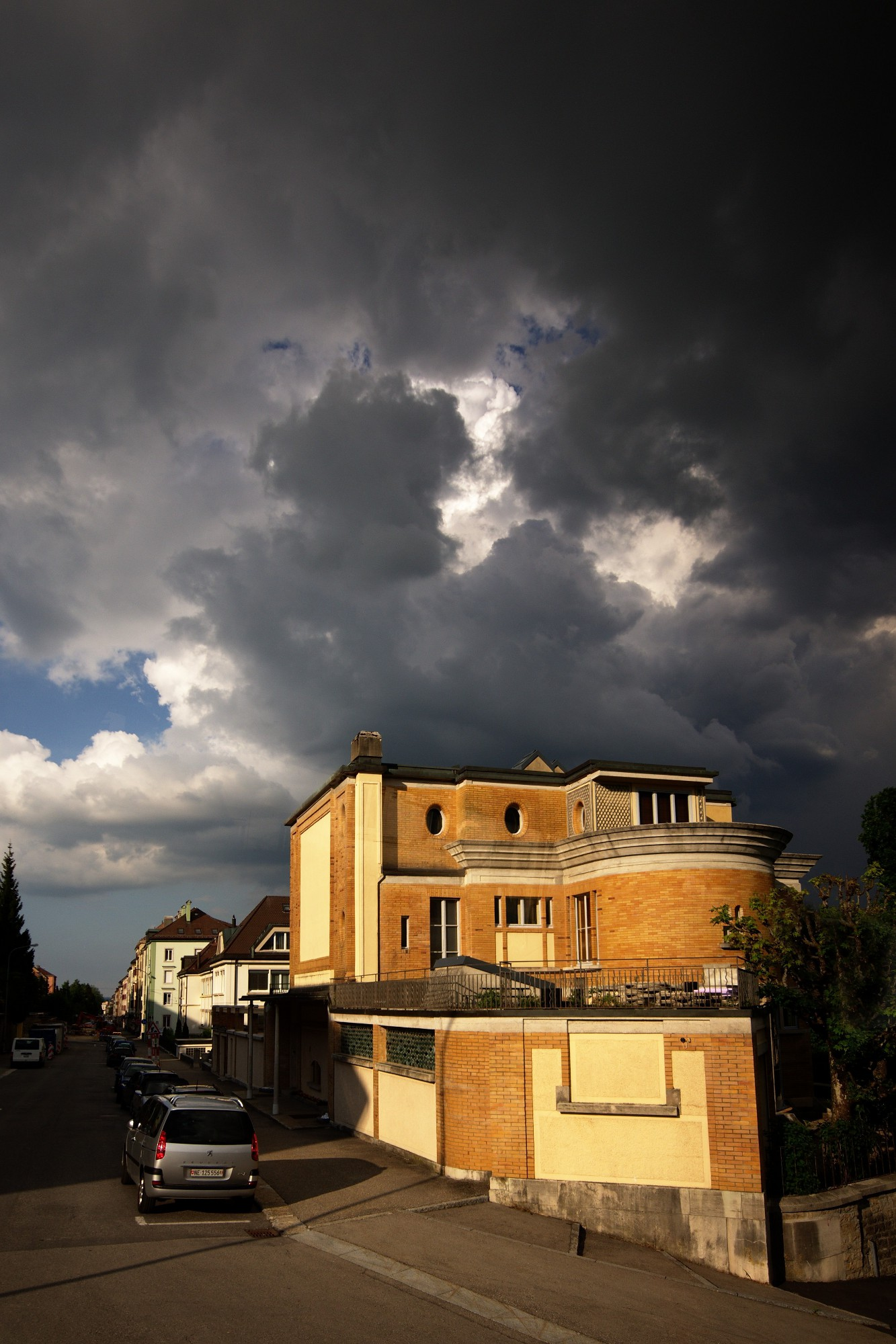 La Villa Turque, construite à La Chaux-de-Fonds entre 1916 et 1917, signée Le Corbusier.